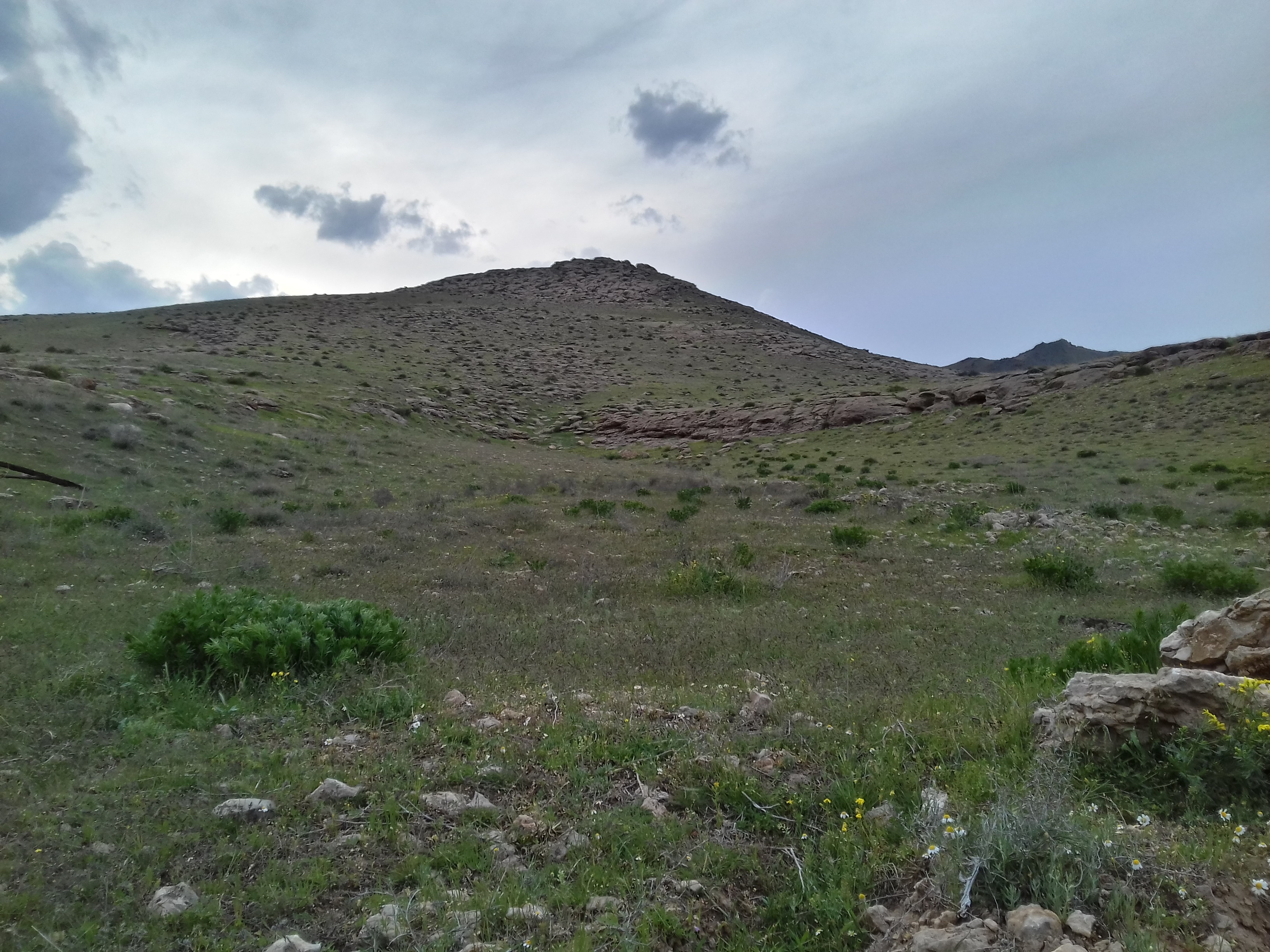 تصاویری از حومه روستای نجف آباد ارومیه، شامل طبیعت بکر و ورودی و... را مشاهده میکنید